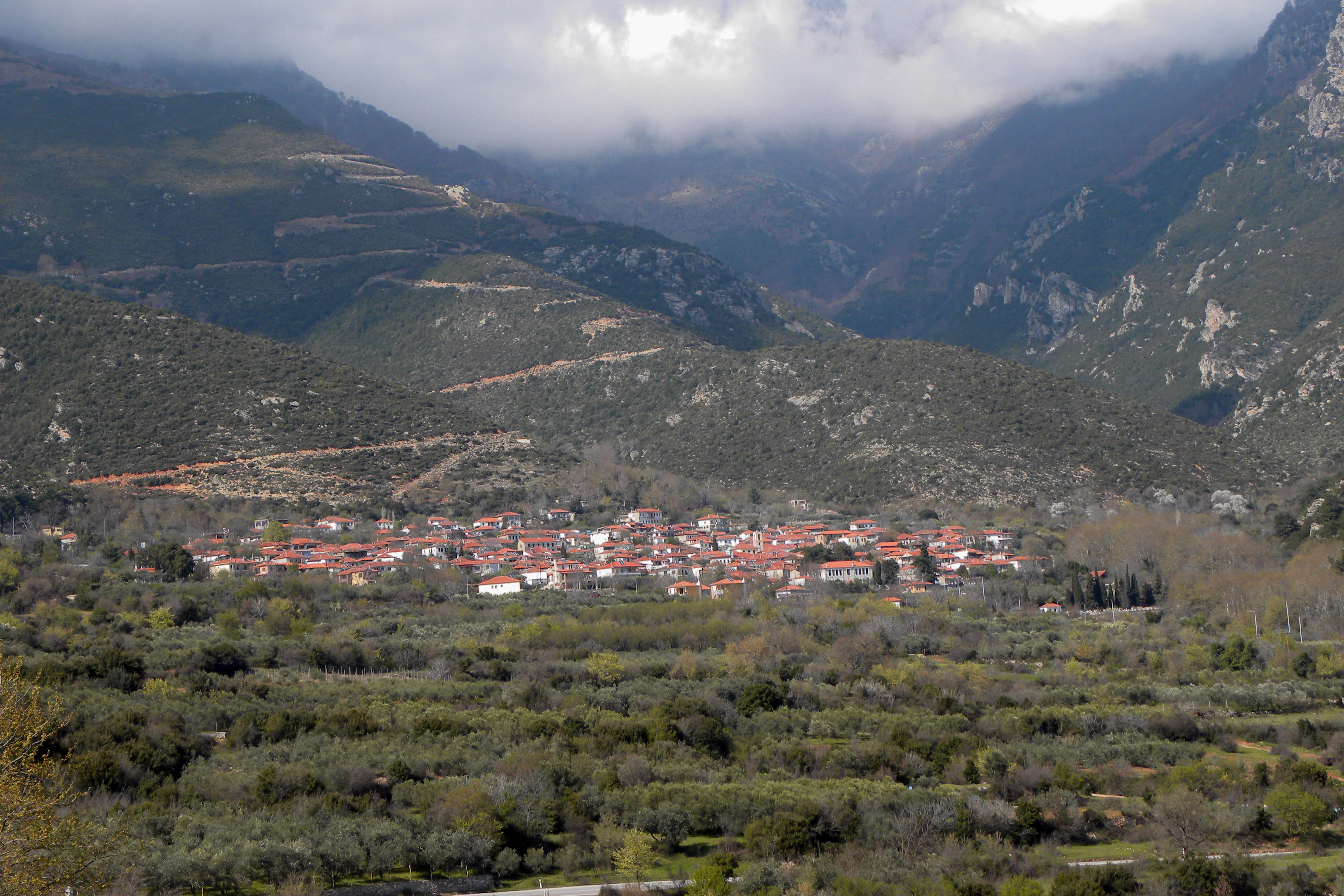 Μεσορόπη